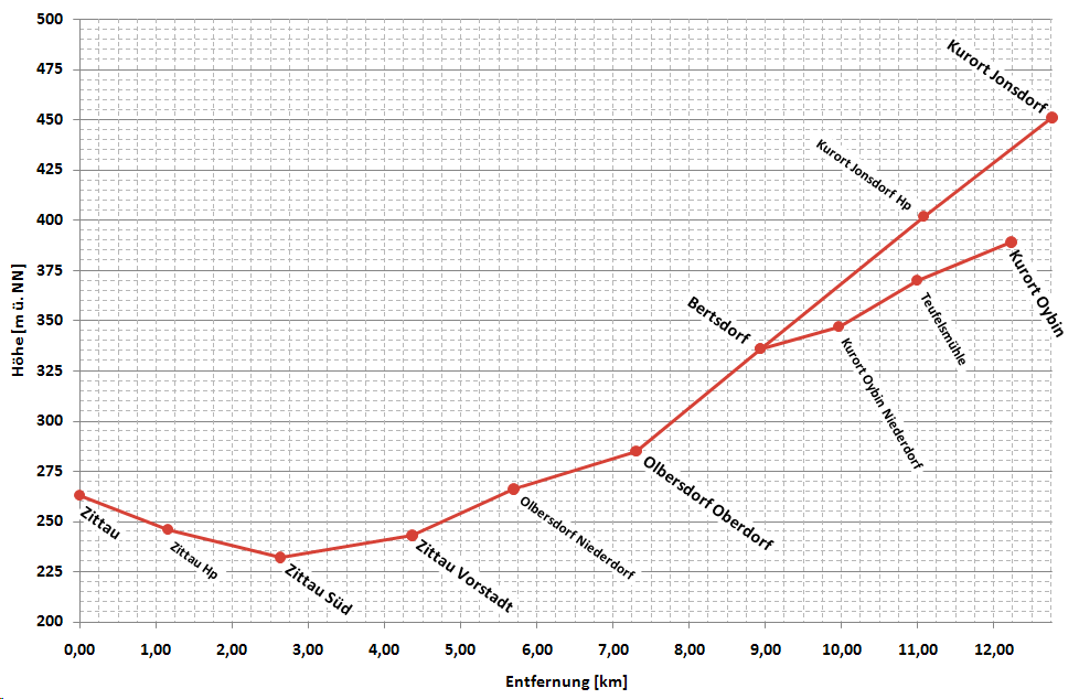 vereinfachtes Höhenprofil der Strecken